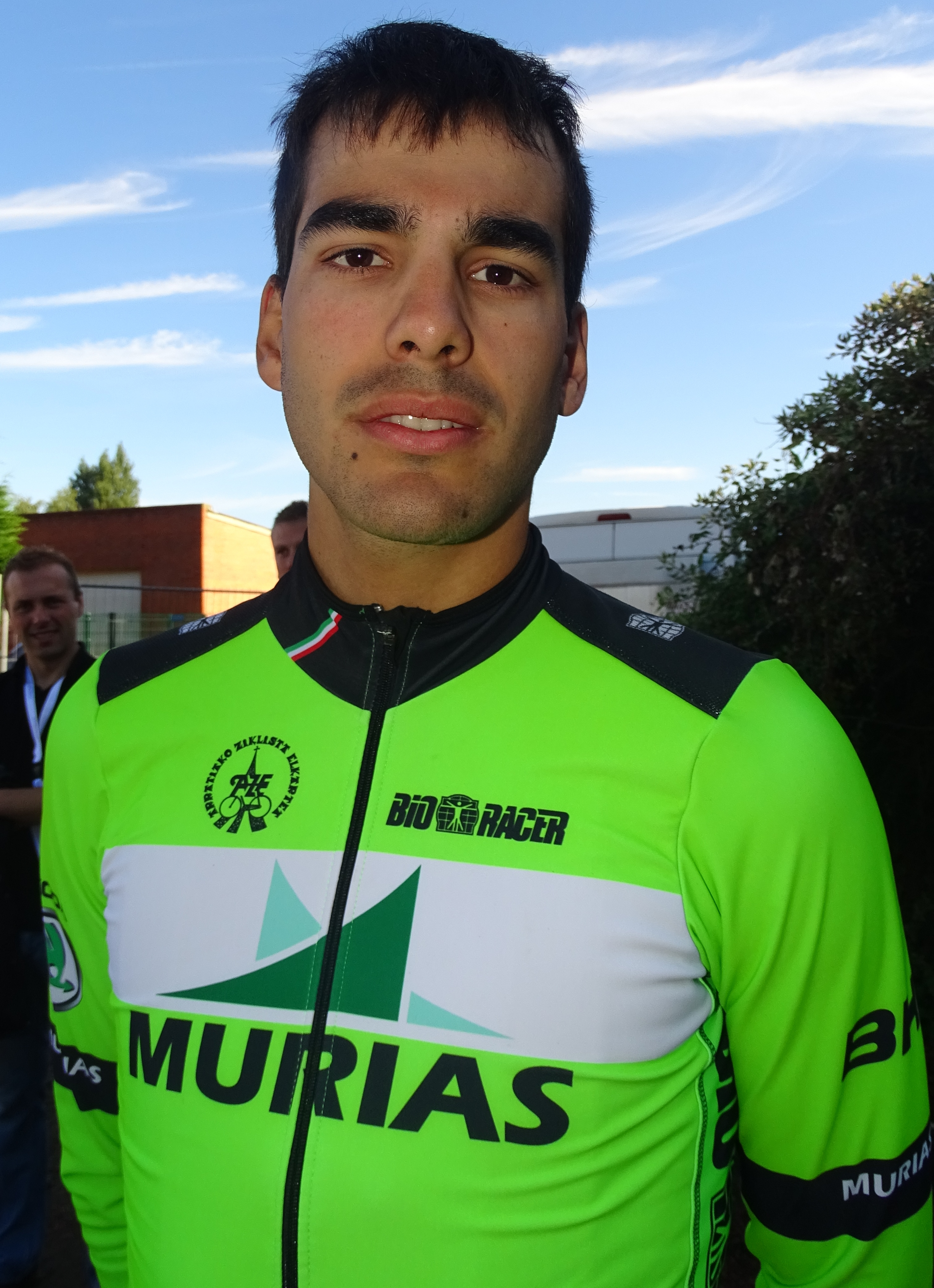 Reportage réalisé le dimanche 20 septembre à l'occasion du départ et de l'arrivée du Grand Prix d'Isbergues 2015 à Isbergues, Nord-Pas-de-Calais, France.